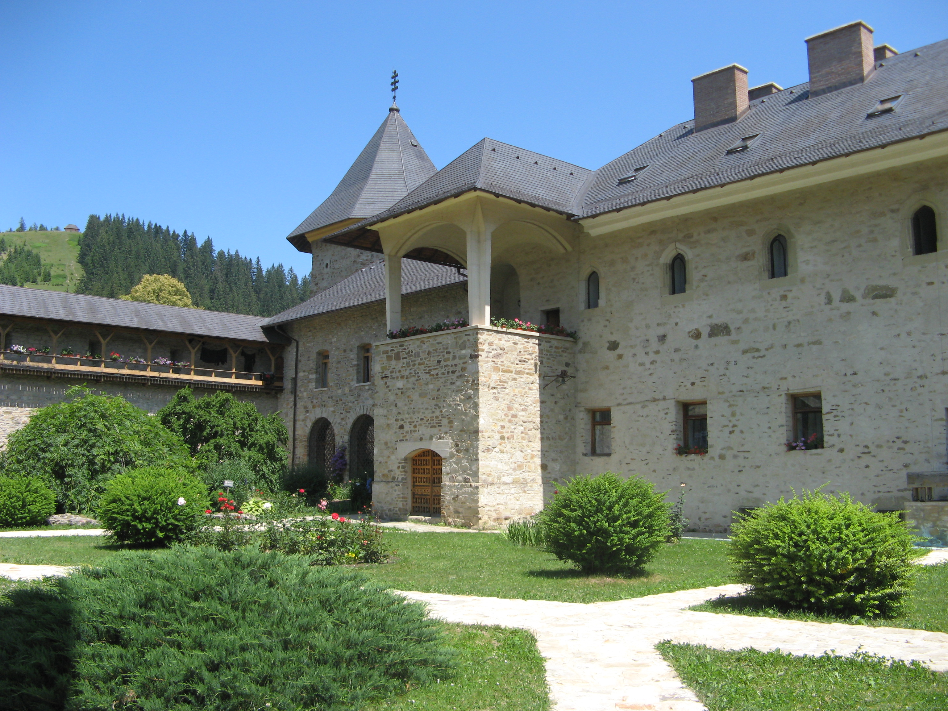 Chilii 02